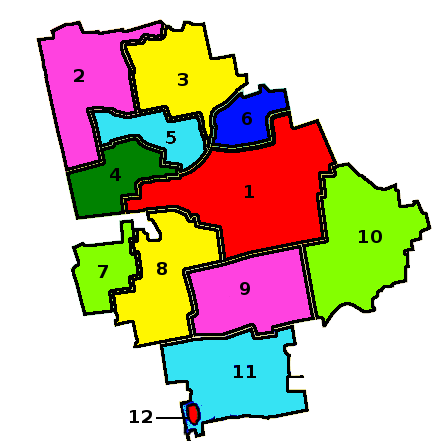 Gemeindegliederung Rajon Sofijiwka, Oblast Dnipropetrowsk, Ukraine. 1:Sofijiwka 2:Ordo-Wassyliwka 3:Persche Trawnja 4:Dewladowe 5:Marje-Dmytriwka 6:Saporiske 7:Nowoiuliwka 8:Kamjanka 9:Nowowassyliwka 10:Mykolajiwka 11:Schowtnewe 12:Nowooleksijiwka